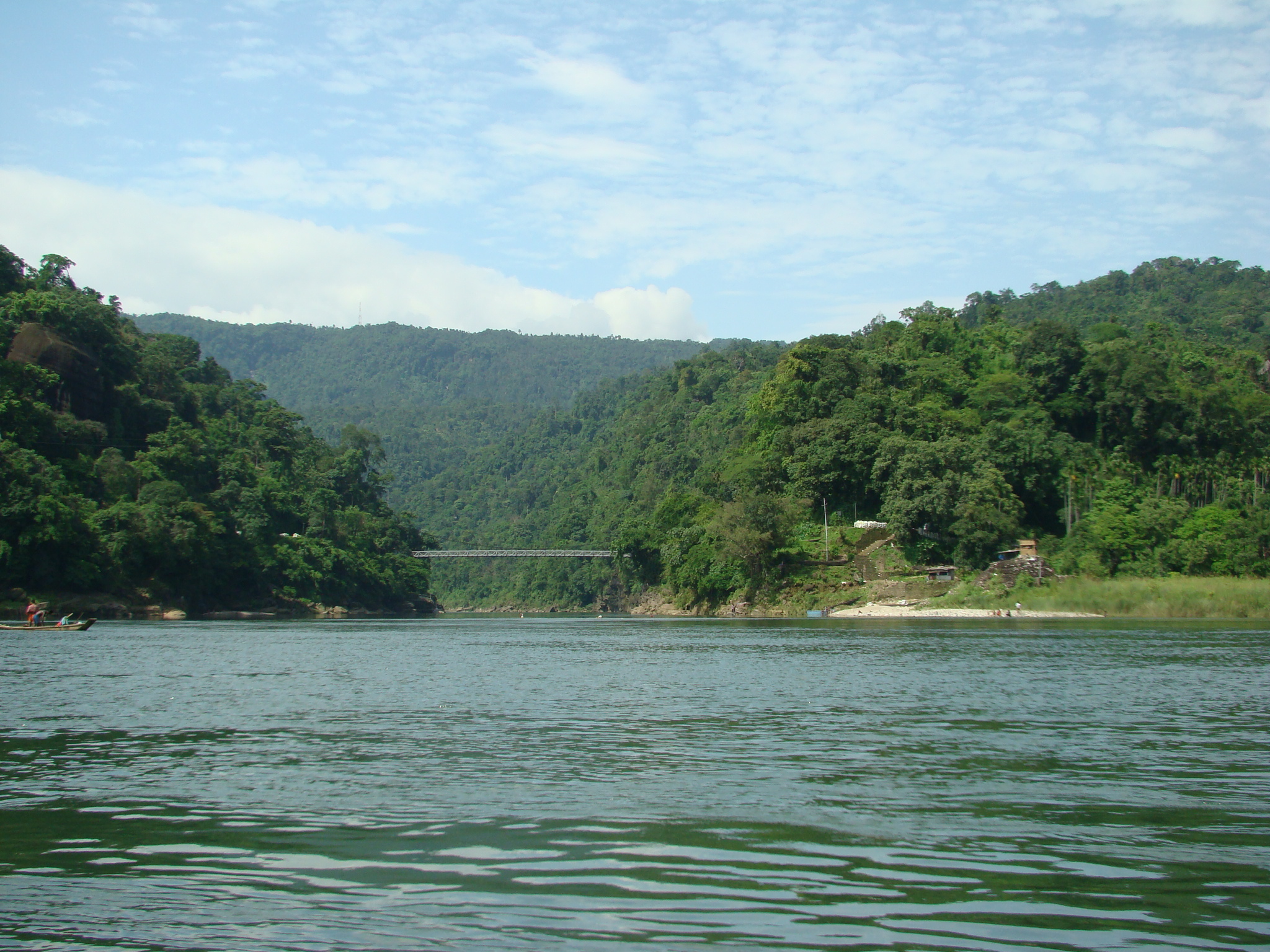 Jaflong Sylhet Bangladesh